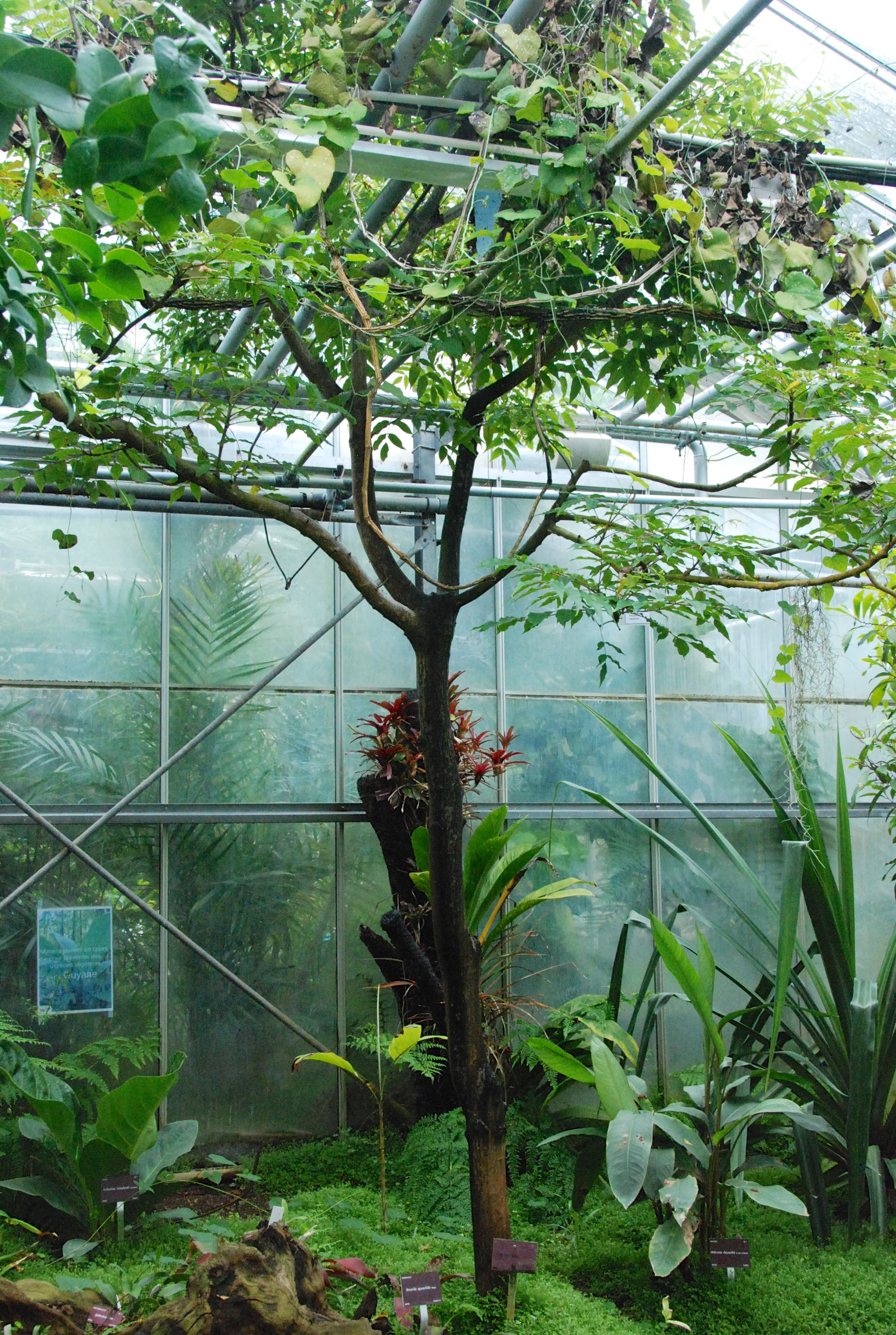 L'espèce "Poupartia castanea" dans les serres tropicales N°4 correspondant au climat forêts tropicales humides du Conservatoire Botanique National de Brest. Photo prise lors des journées contributives au Conservatoire Botanique National de Brest durant l'été 2015